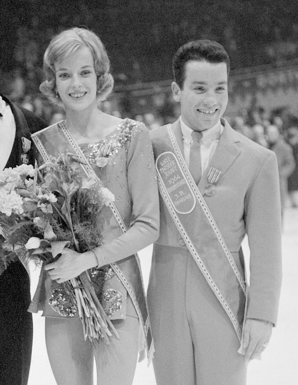 Wereldkampioenschappen kunstrijden te Dortmund, Wilkes-Ravell.